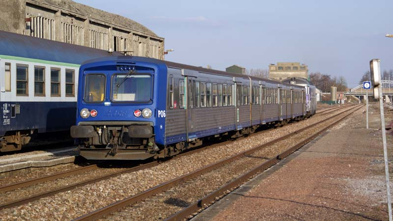 RRR P06 partant de Chaulnes